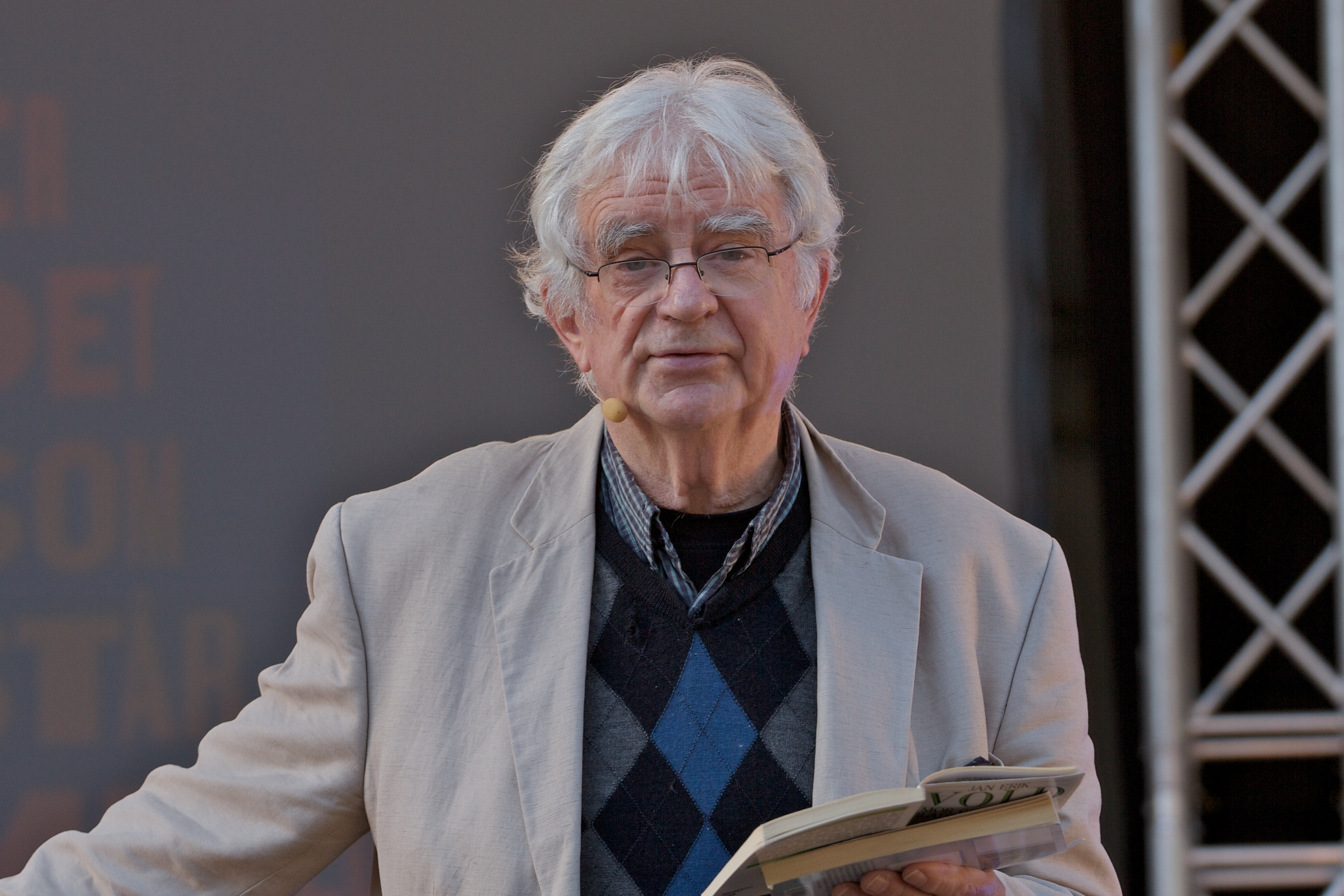 Jan Erik Vold på Oslo bokfestival 2010.